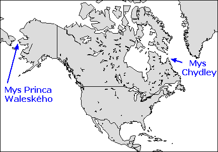 Mapa severnej Ameriky s vyznacenim mysov